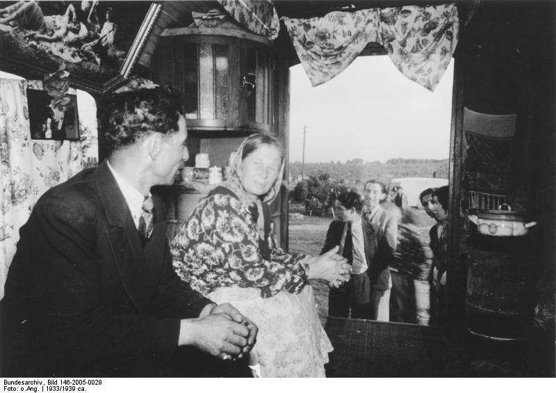 Halle, Wohnwagen von Doisari innen [Zigeunerlager]